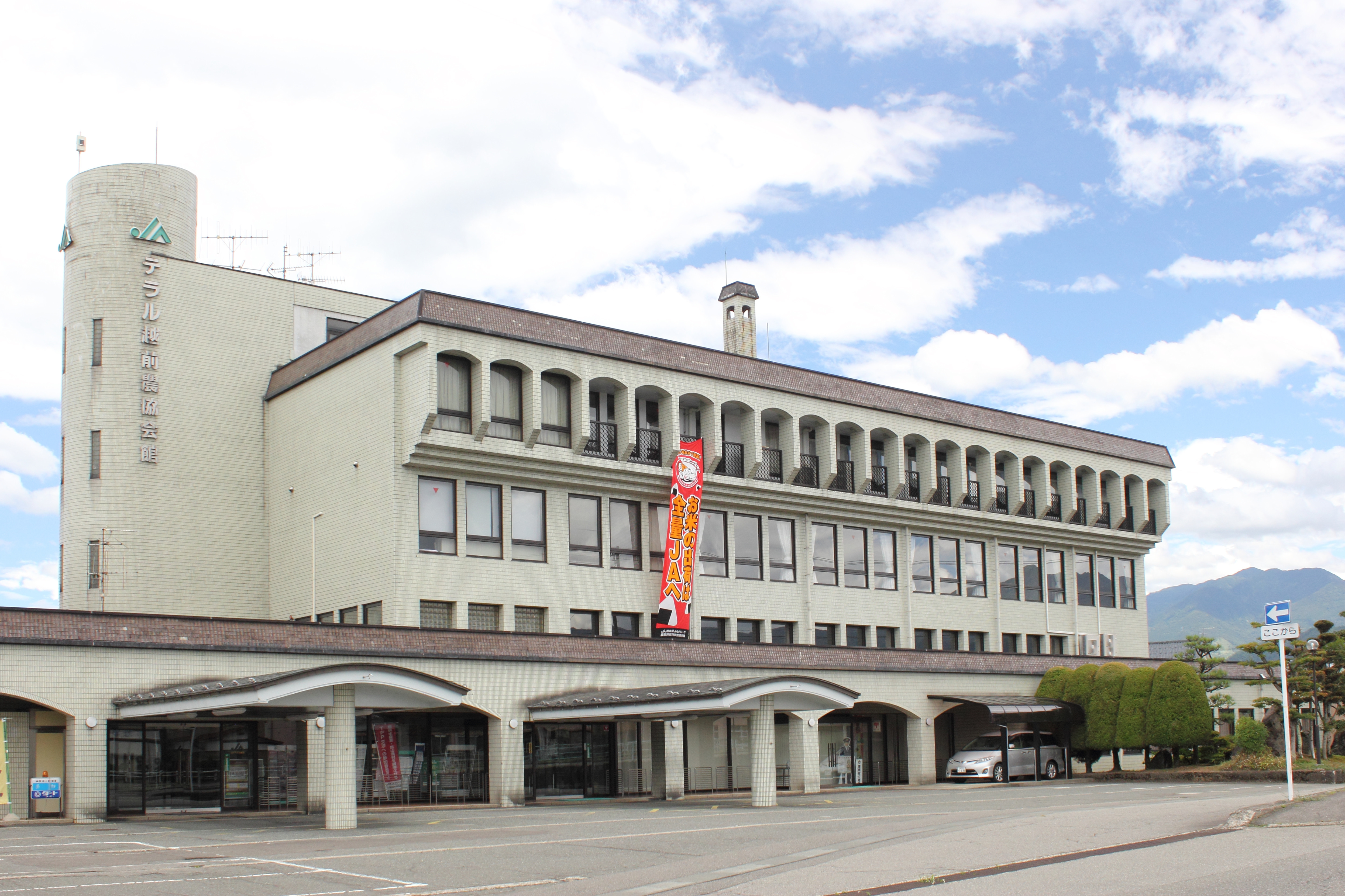 テラル越前農業協同組合 本店